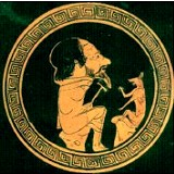 Ο Αίσωπος συνομιλεί με την αλεπού (450 π.Χ., Μουσείο Βατικανού)